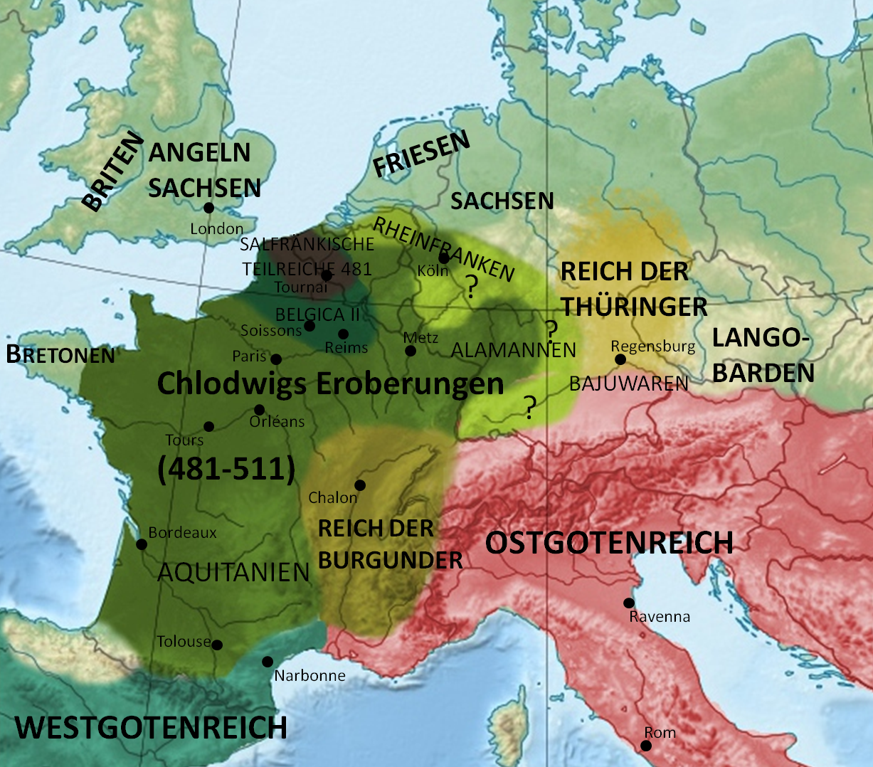 Salische Teilkönigreiche im Jahr 481 und Chlodwigs Eroberungen bis zum Jahr 511 Nachweise: Eugen Ewig: Die Merowinger und das Frankenreich. Kohlhammer Verlag, Fünfte aktualisierte Auflage 2006. Matthias Springer: Die Sachsen. Kohlhammer, Stuttgart 2004, ISBN 3-17-016588-7. Dieter Geuenich: Geschichte der Alemannen. 2., überarbeitete Auflage, Kohlhammer, Stuttgart 2005, ISBN 978-3-17-018227-1. Herwig Wolfram: Die Goten. 4. Aufl., C.H. Beck, München 2001. ISBN 3-406-33733-3.